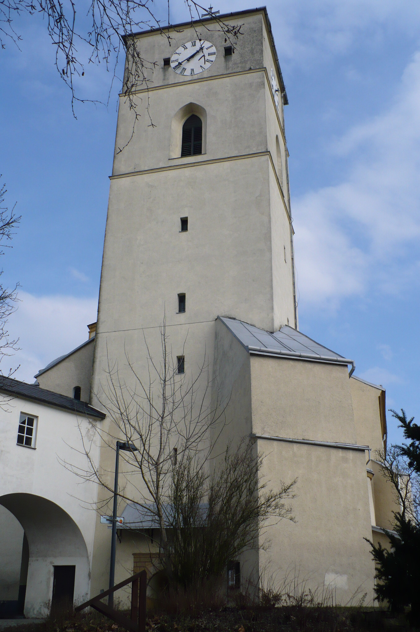 věž a opěrák